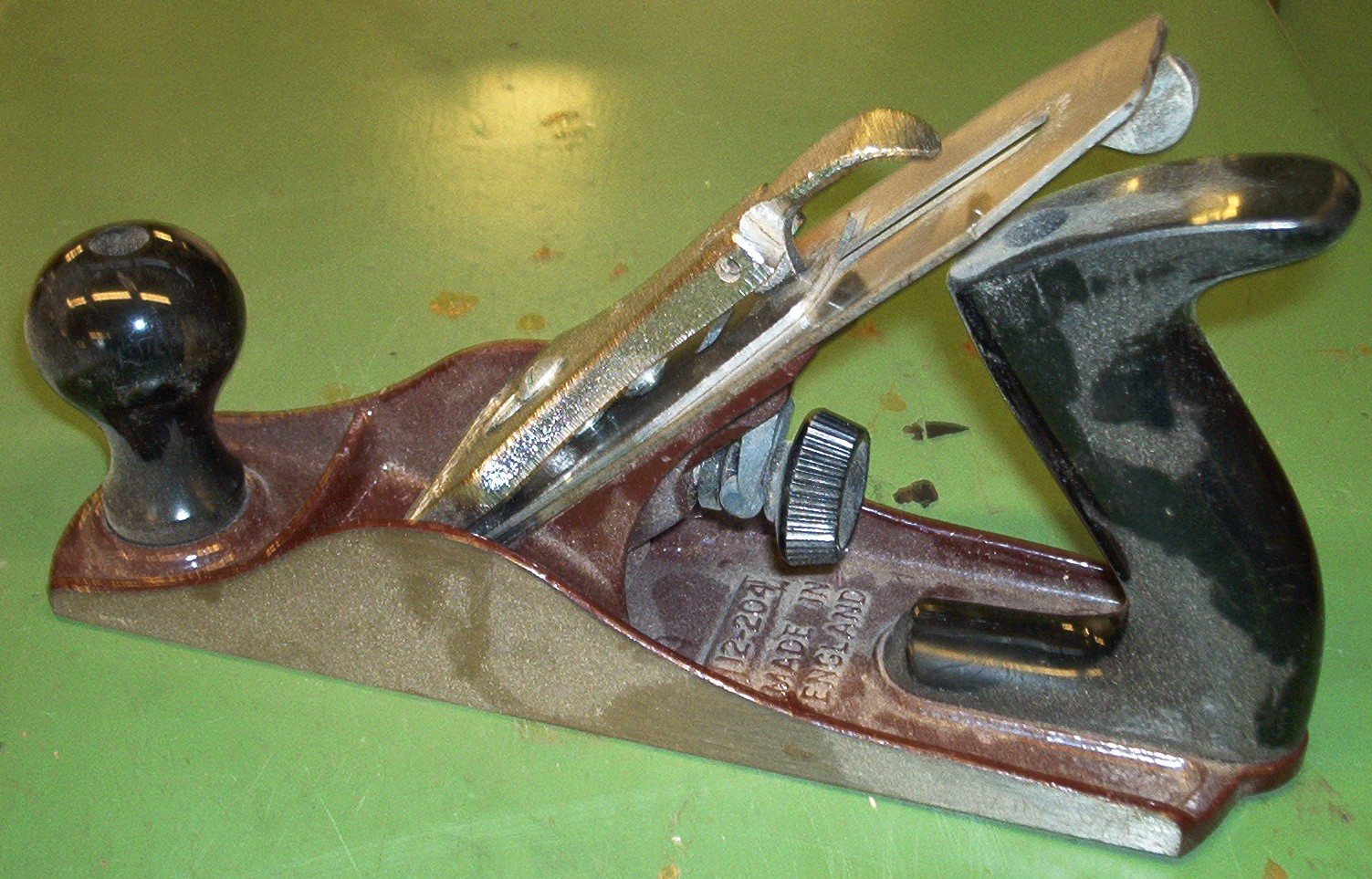 Stalen blokschaaf zelf gemaakte foto voor het publiek domein. Martink. Licensing Categorie:Afbeelding gereedschap